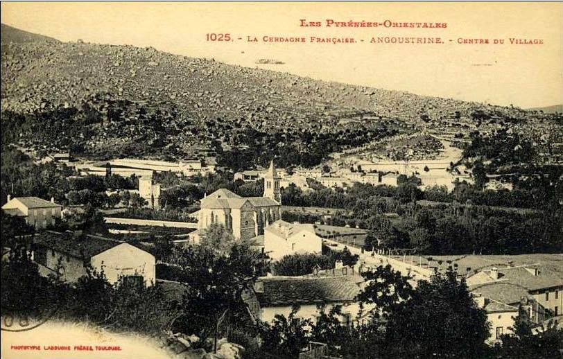 Vue générale d'Angoustrine